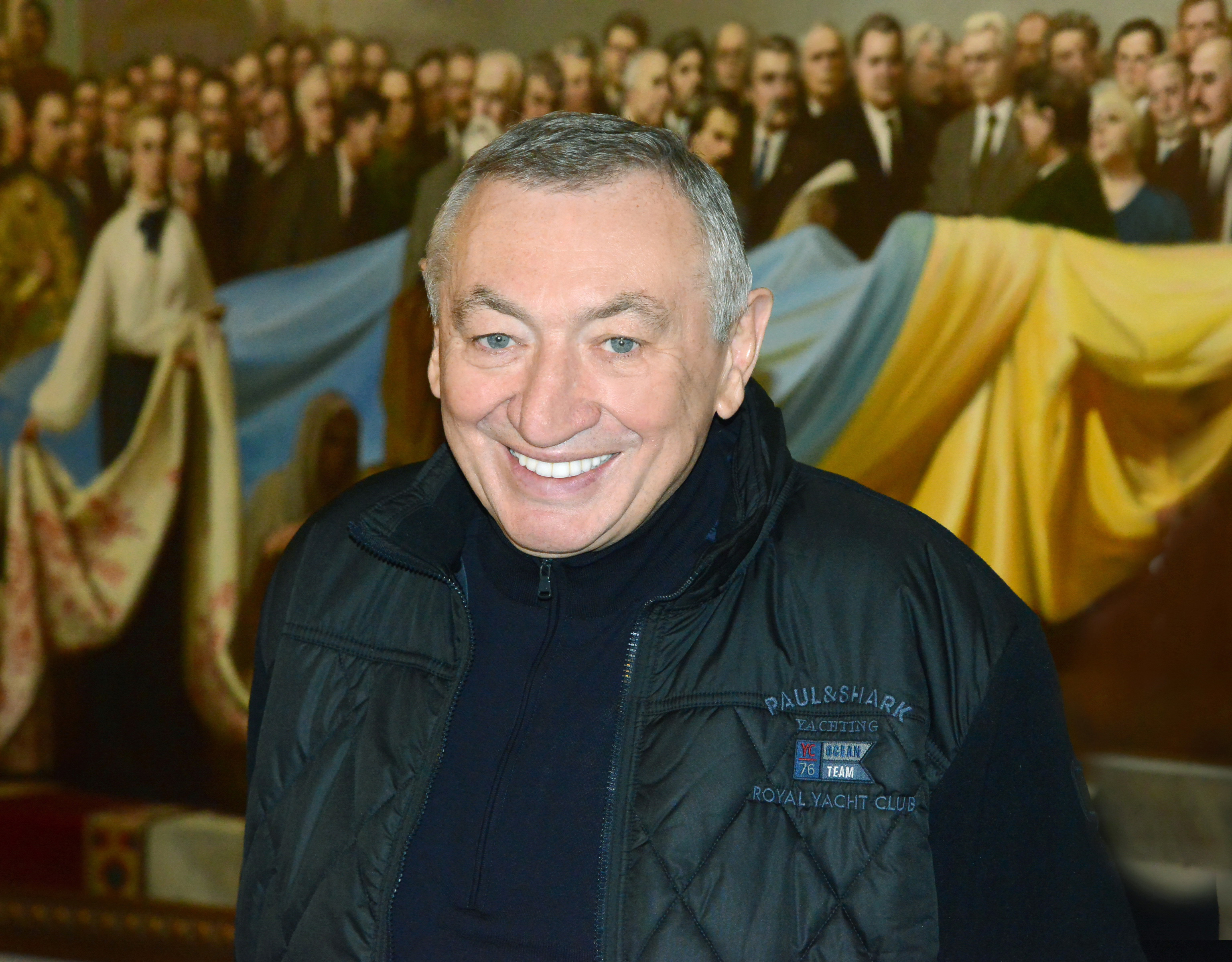 Гурвиц, Эдуард Иосифович, ВЕРХОВНАЯ РАДА УКРАИНЫ , фото Вадим Чуприна, 2016-11-10